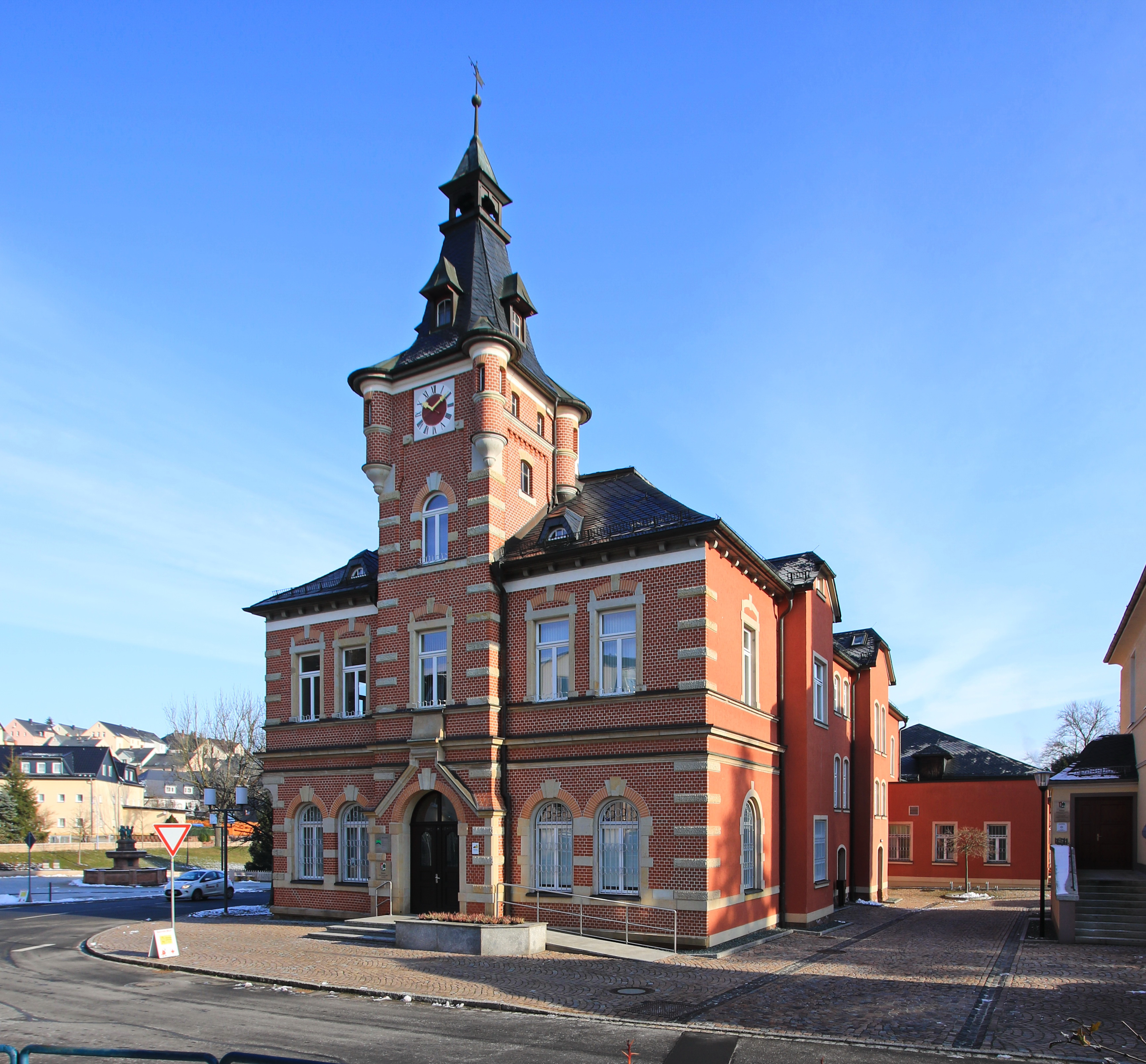 Rathaus in Oelsnitz Erzgebirge.